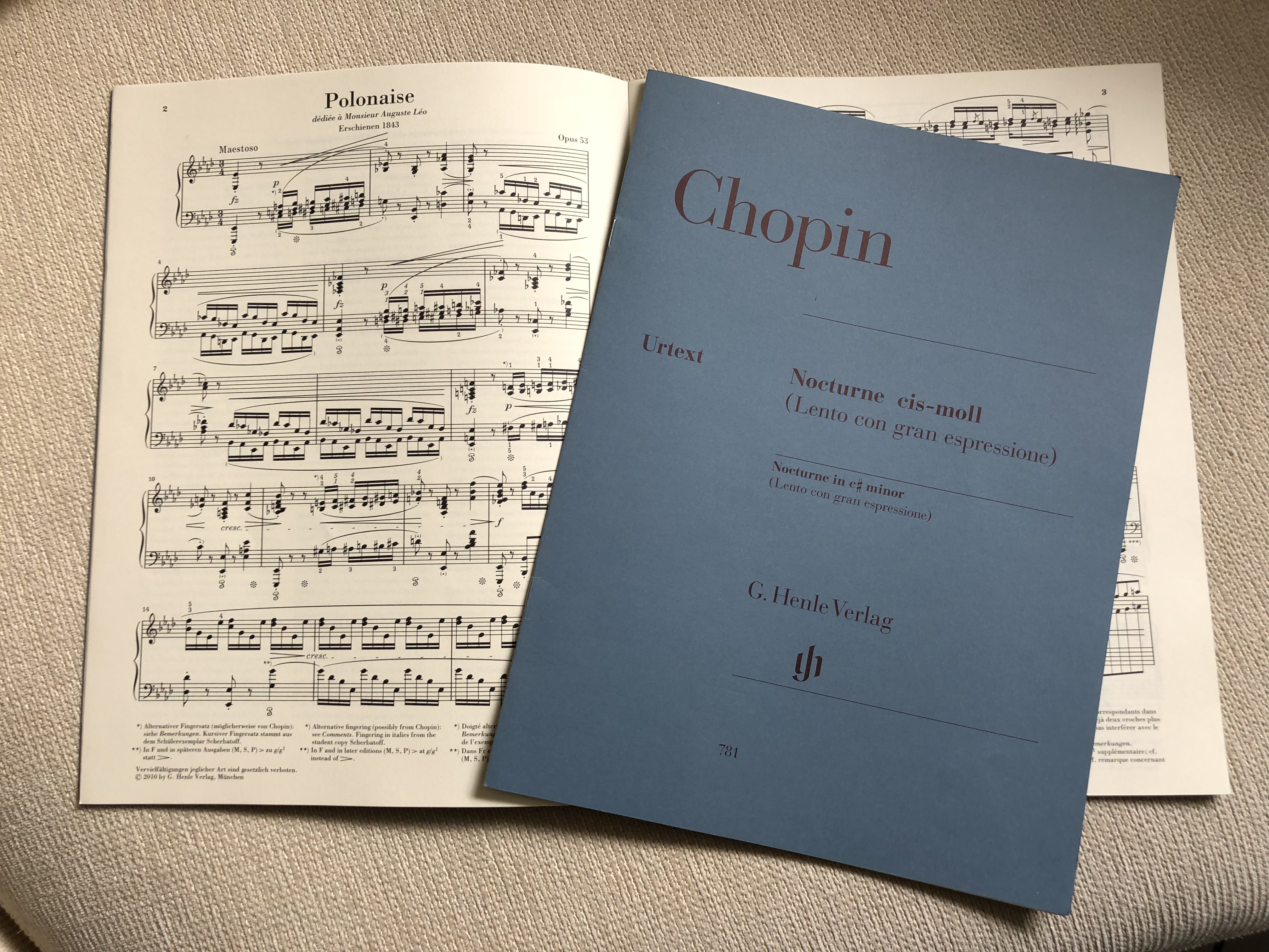 Henle Urtext-Ausgaben von Chopin